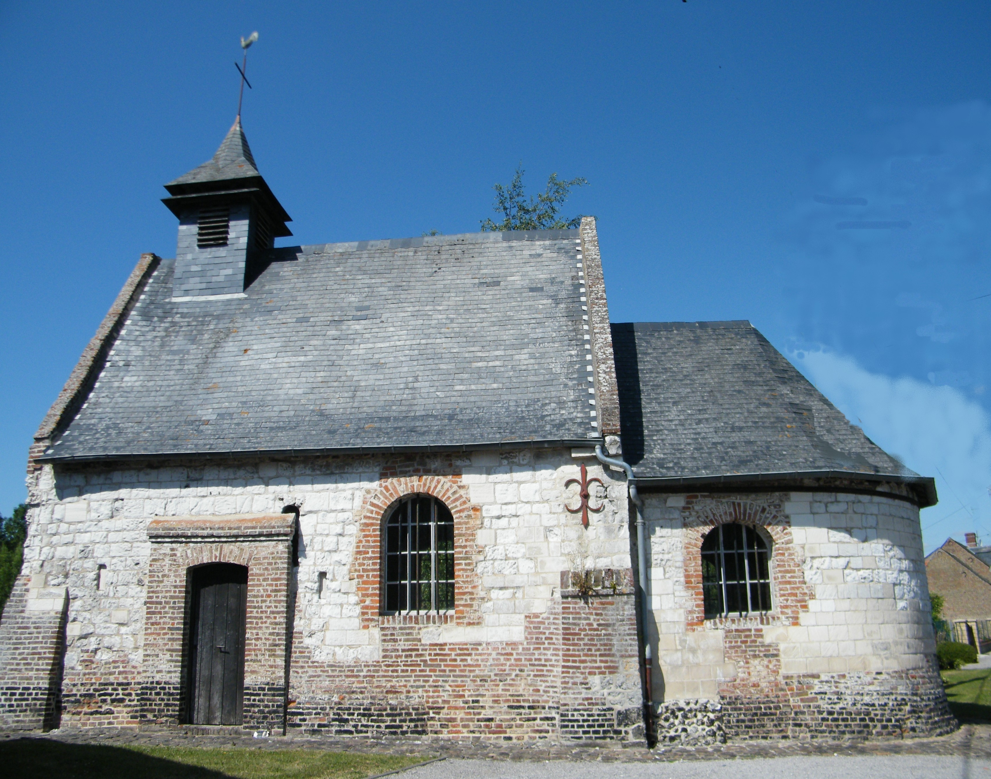 Chapelle Ste Marguerite, Mareuil-Caubert, Somme, France